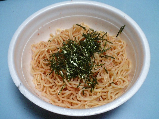 醤油バターたらこ。10年ぶりにたべたよ。Spa-oh, King of Spagetti